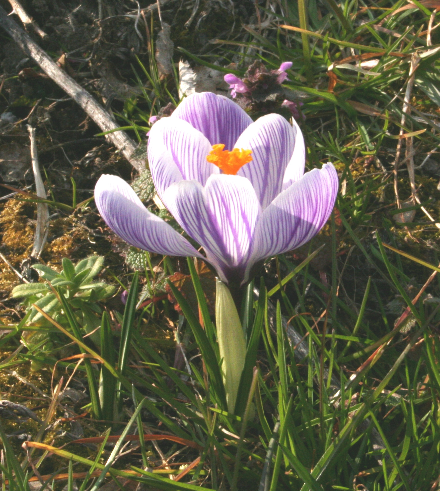 Crocus_biflorus (Zafferano selvatico) Località : Pascoli (BL), 705 m s.l.m.